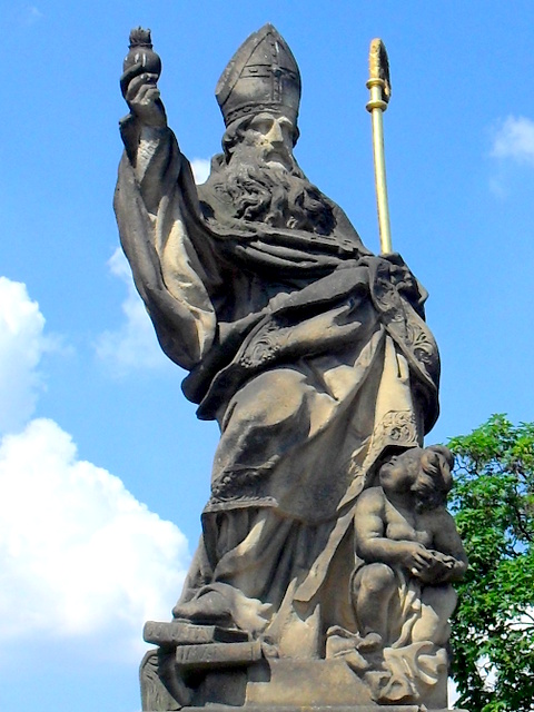 Święty Augustyn na moście Karola w Pradze